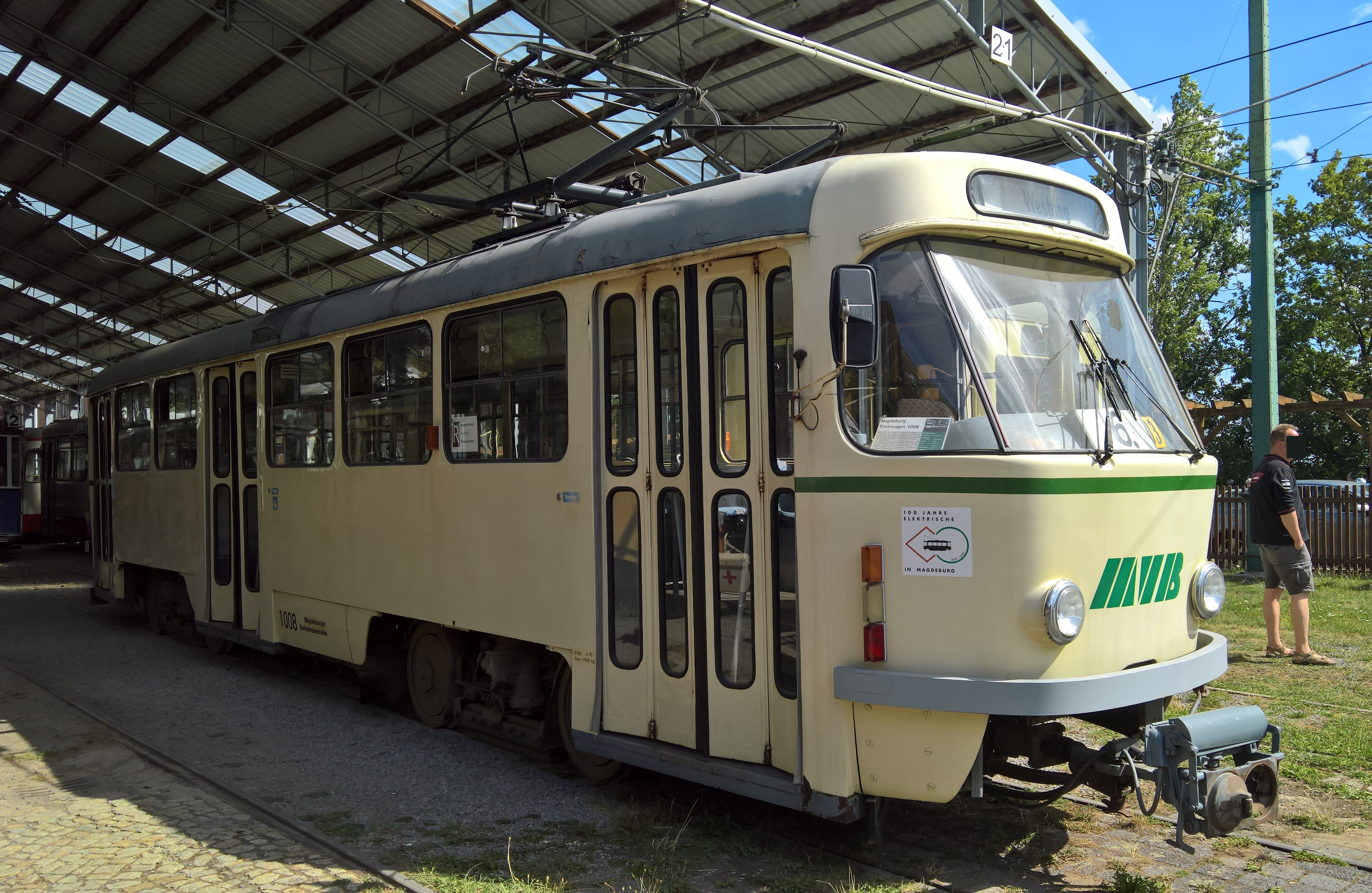 ČKD Tatra T4D ev. č. 1008 původem z Magdeburgu jako muzejní exponát v Hannover Straßenbahn-Museum